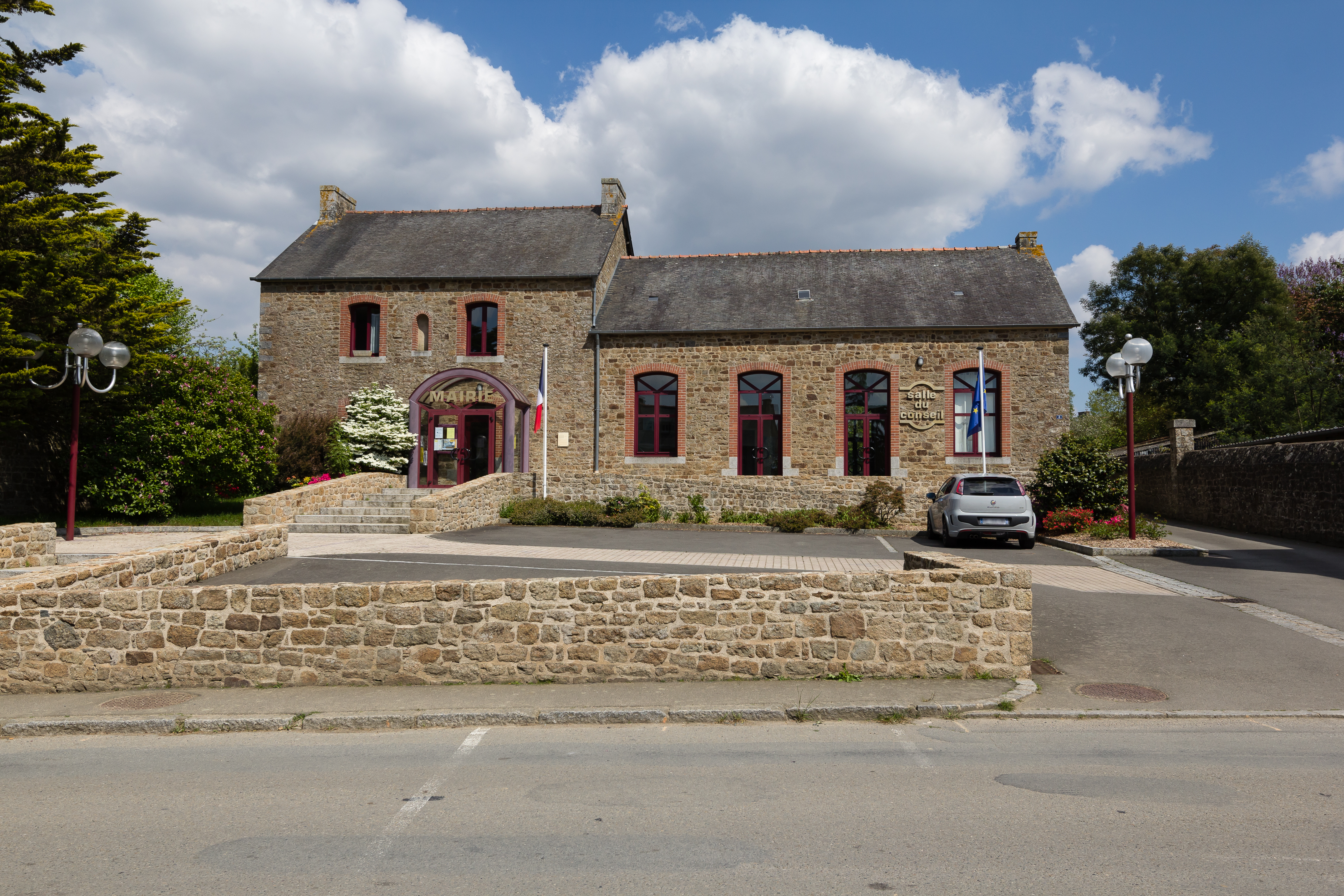 Mairie de Saint-Pern (France).